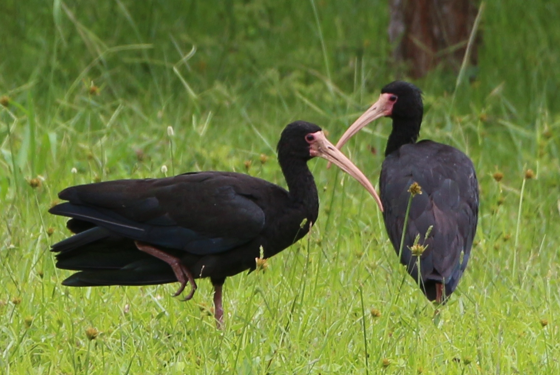 tapicuru de cara pálida em repouso